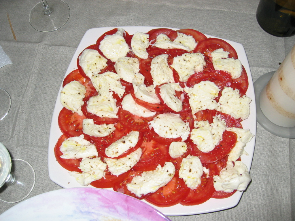 Tomate Mozzarella d'Elise